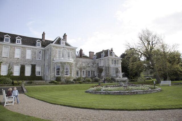 Firle Place, Firle, East Sussex